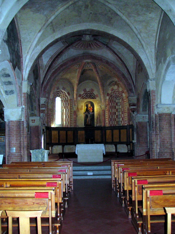 Asti, Chiesa di Santa Maria di Viatosto: interno, navata centrale.